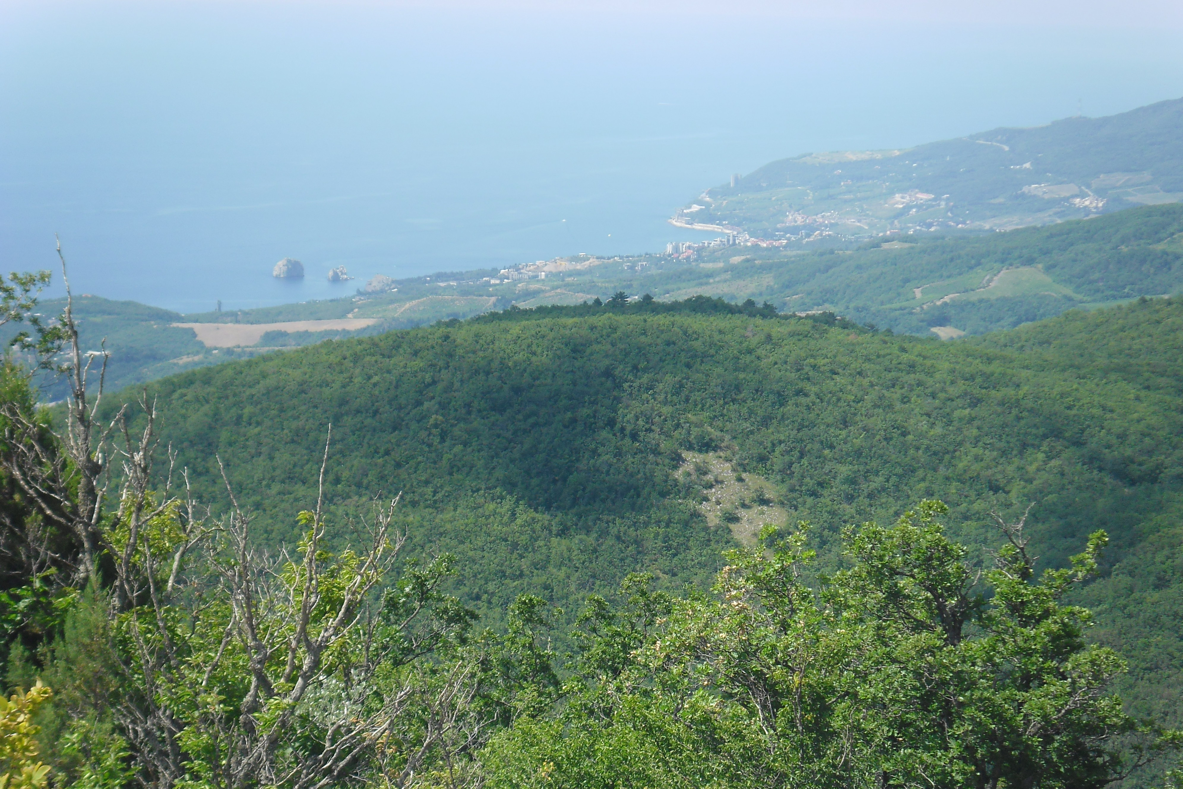 Фото